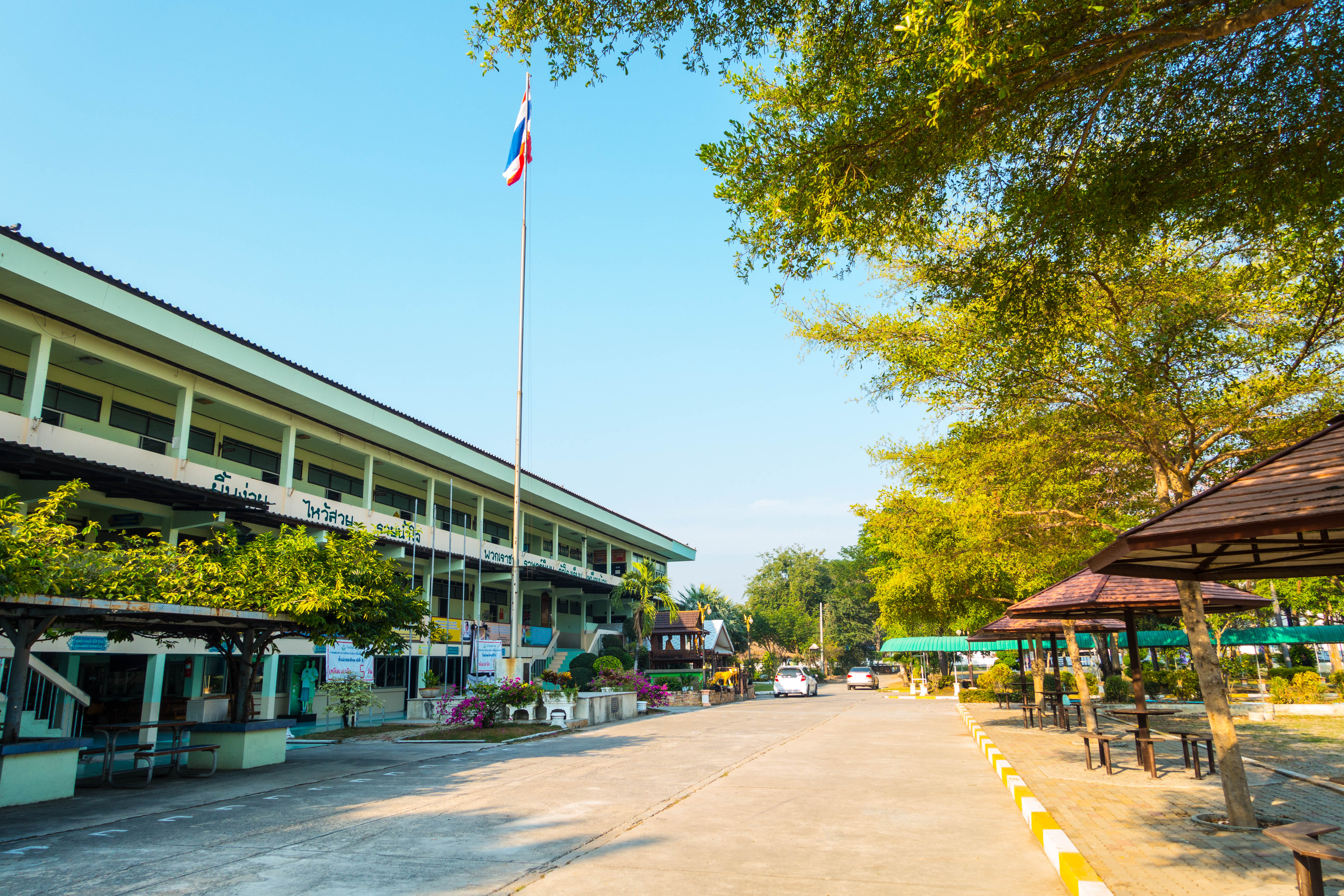 ภาพโรงเรียนราษฎร์นิยม